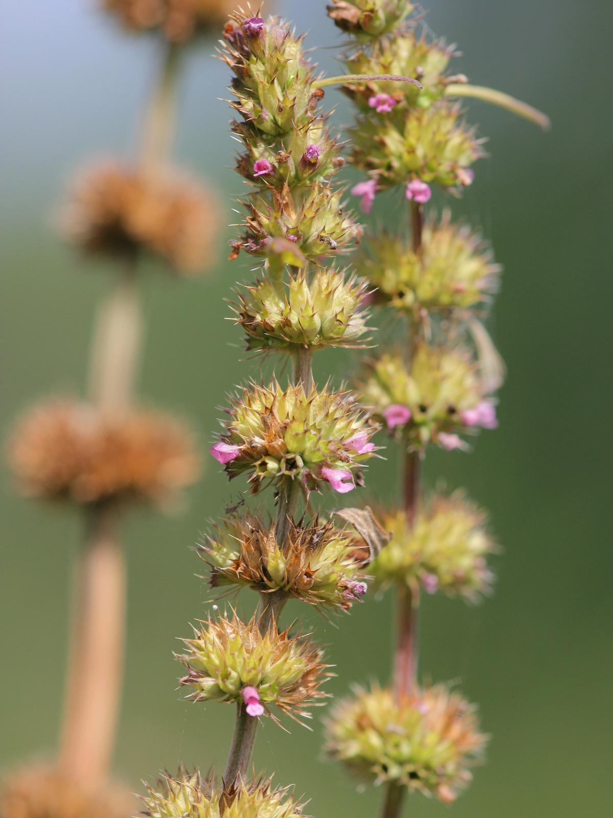 Filziges Herzgespann (Leonurus marrubiastrum)